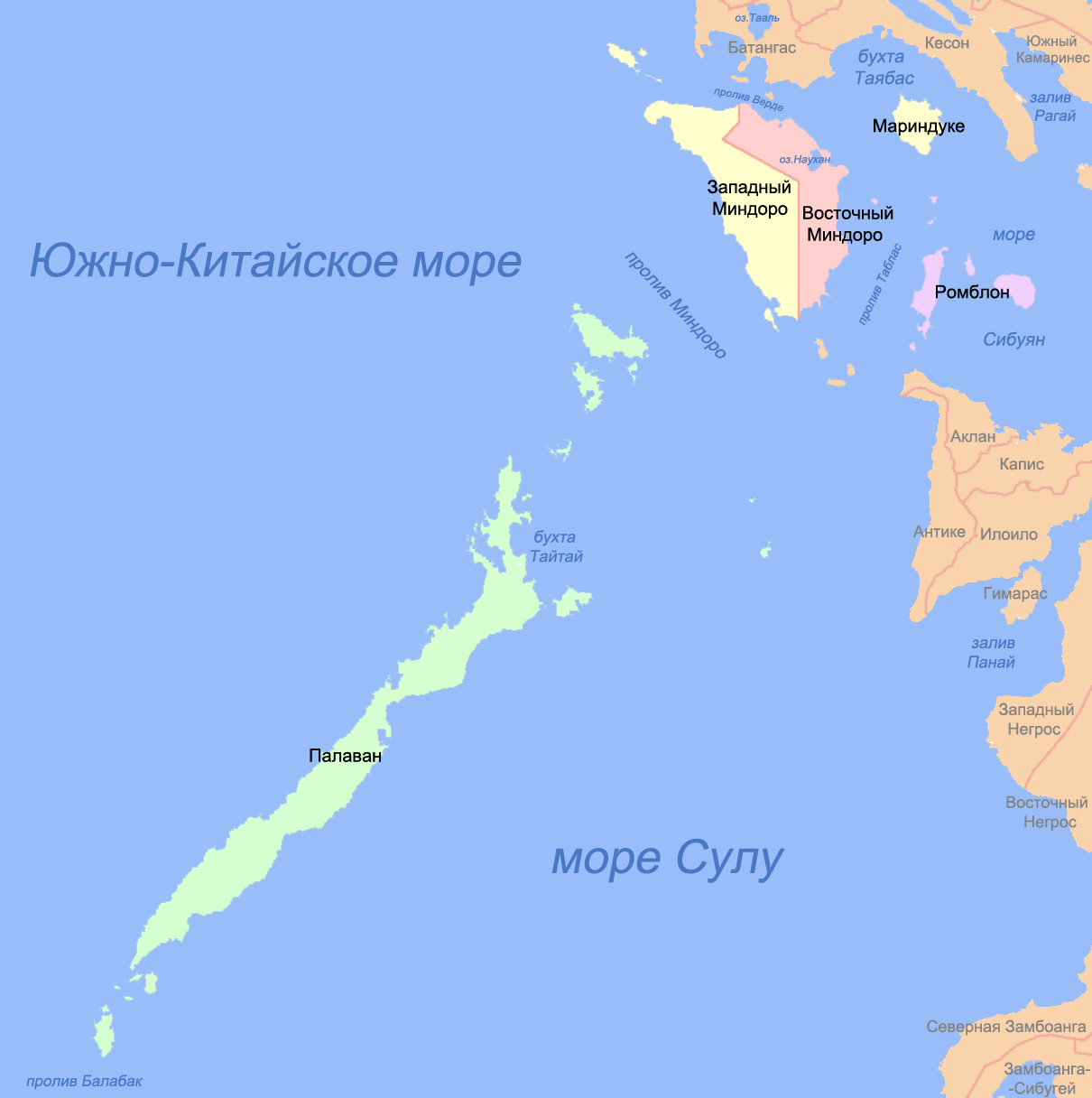 Карта провинций региона Мимаропа (Филиппины)